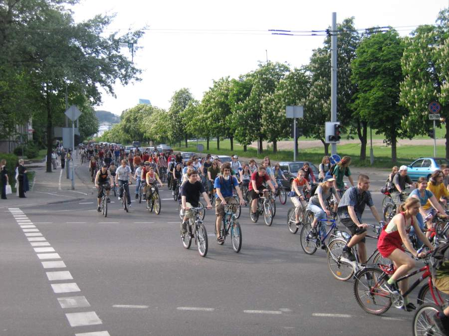 Kritinė masė Vilniuje.